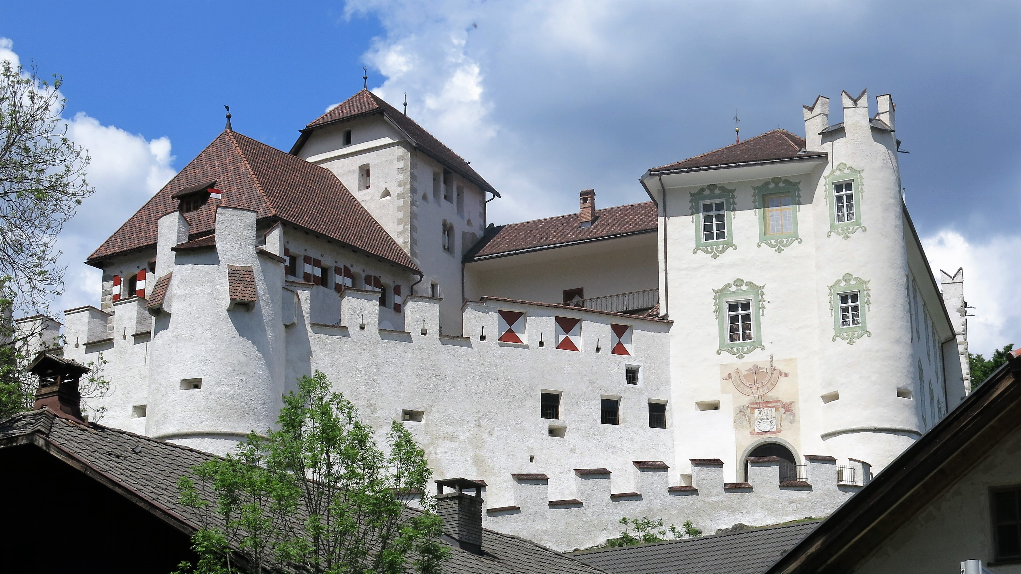 Schloss Ehrenburg in Südtirol (Gemeinde Kiens) im Mai 2017, Ansicht von Osten